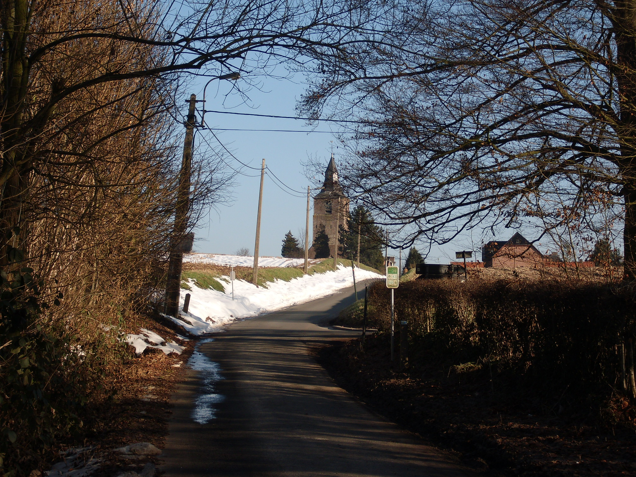 Sint-Antelinks - Herzele - Oost-Vlaanderen - Vlaanderen - België